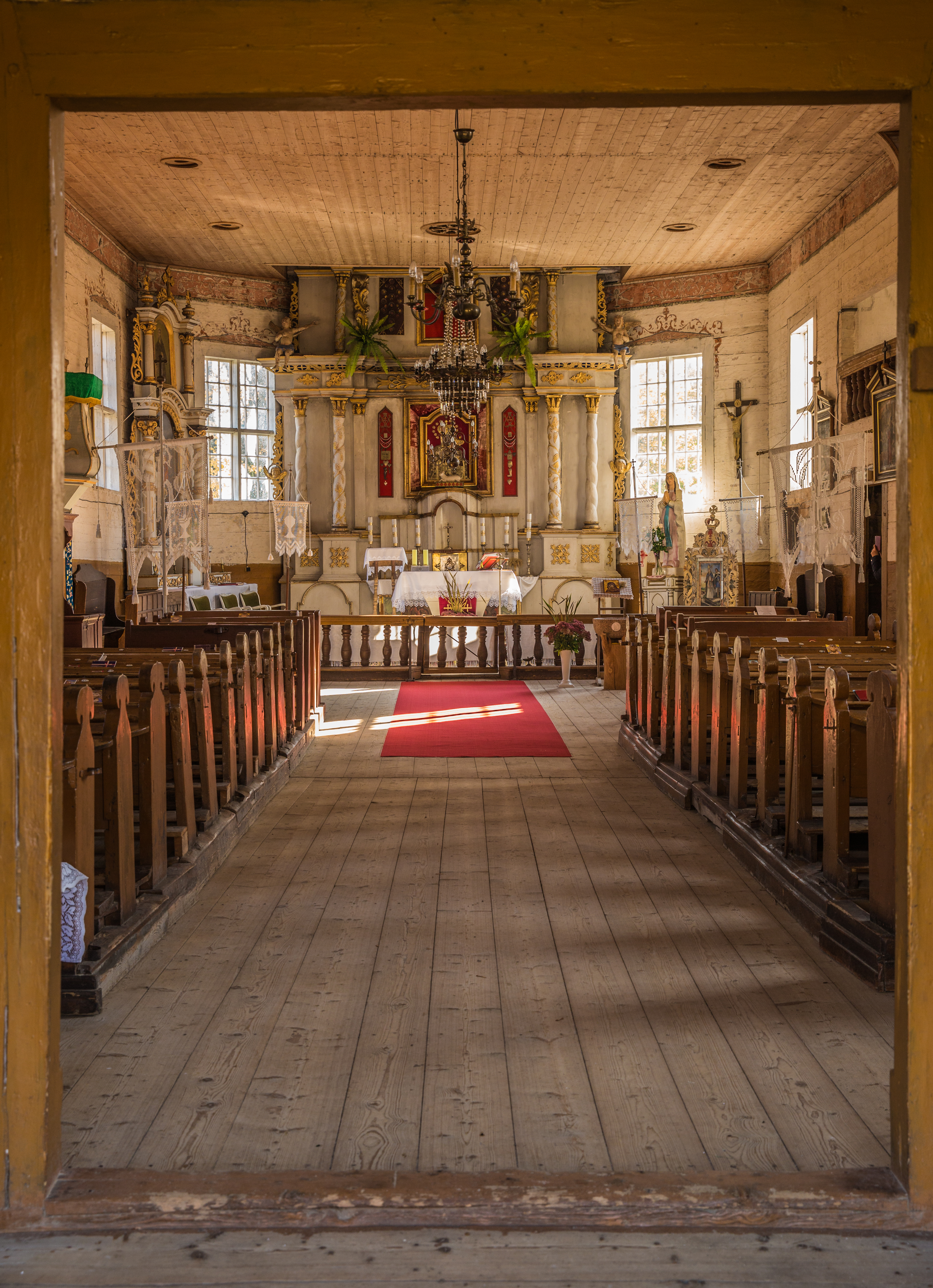 Beržoro šv. Stanislovo bažnyčios vidus